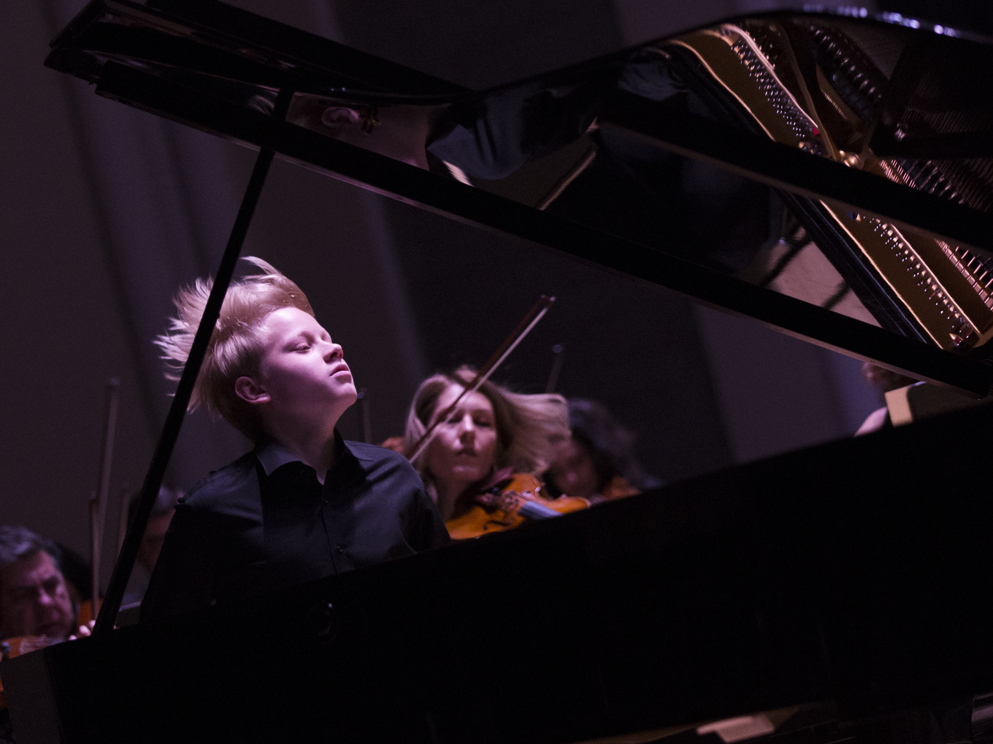 Александр Малофеев (май 2017). Фото Людмилы Малофеевой.